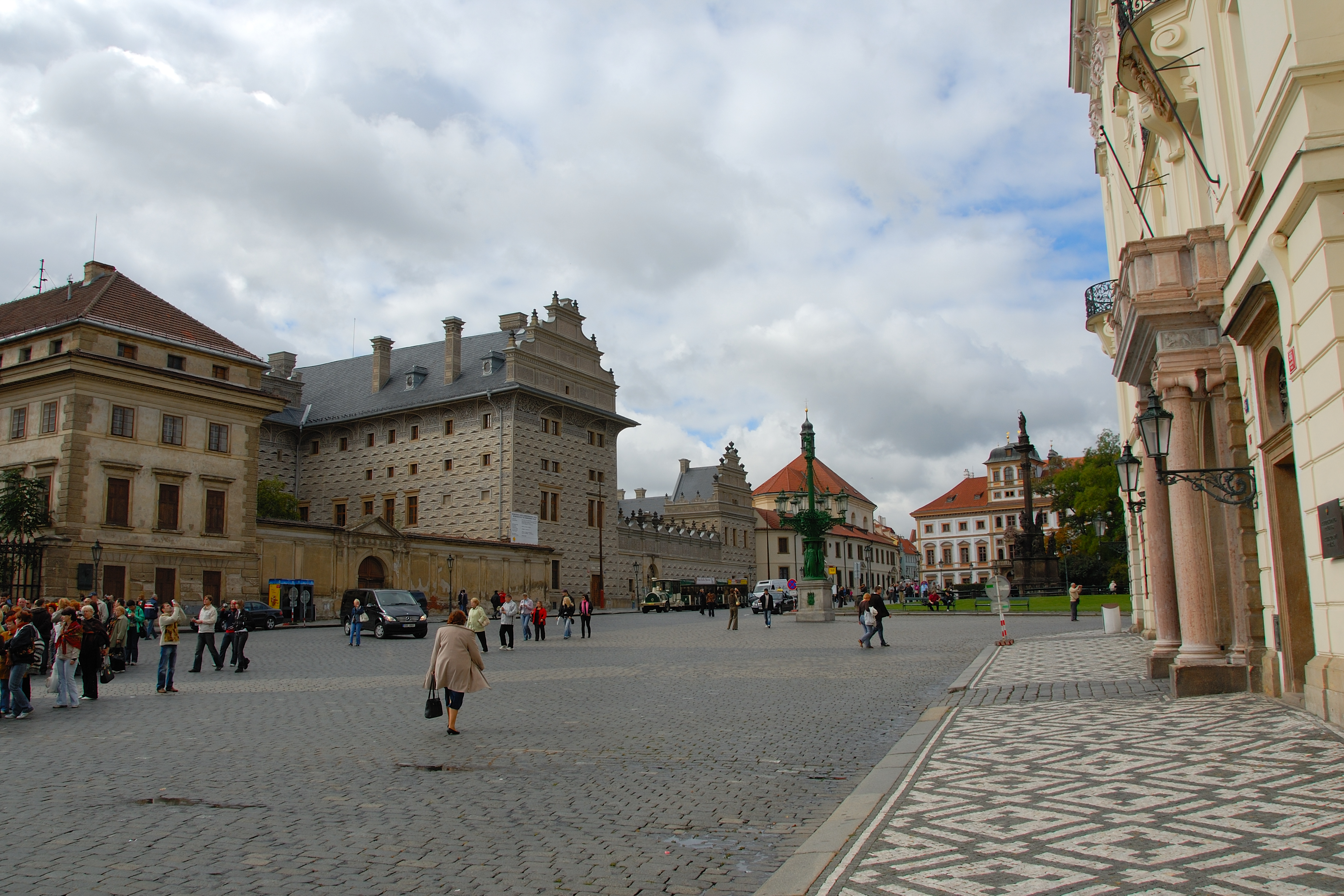 Praha, Hradčanské náměstí